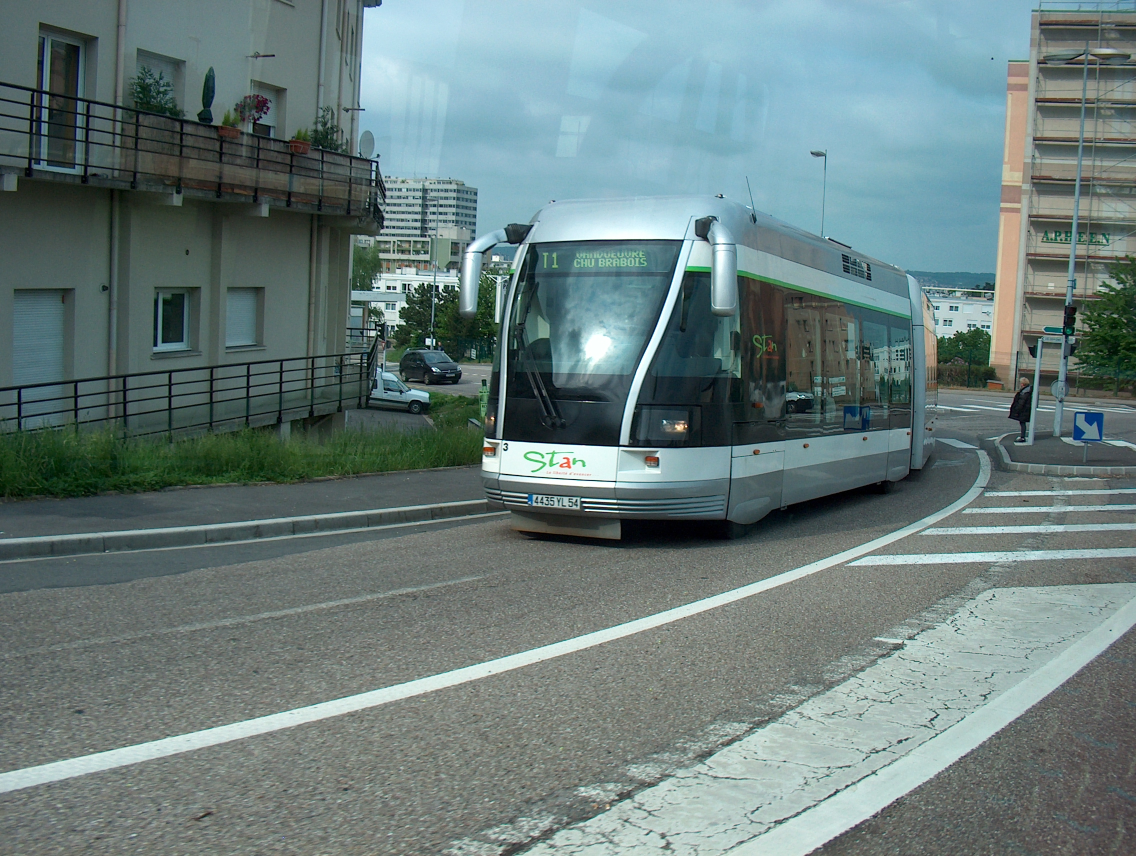 Un tram de Nancy vient de quitter l'arrêt "vélodrome", et monte vers Brabois par l'avenue du Gal Leclerc, en traction diesel, et en mode non guidé. Pas de perches, pas de rails, un moteur diesel. Que reste-t-il du tramway ? Photo prise le 10 mai 2006, par moi même. L'itinéraire est une déviation de la ligne normale. Muselaar 7 septembre 2006 à 00:36 (CEST)